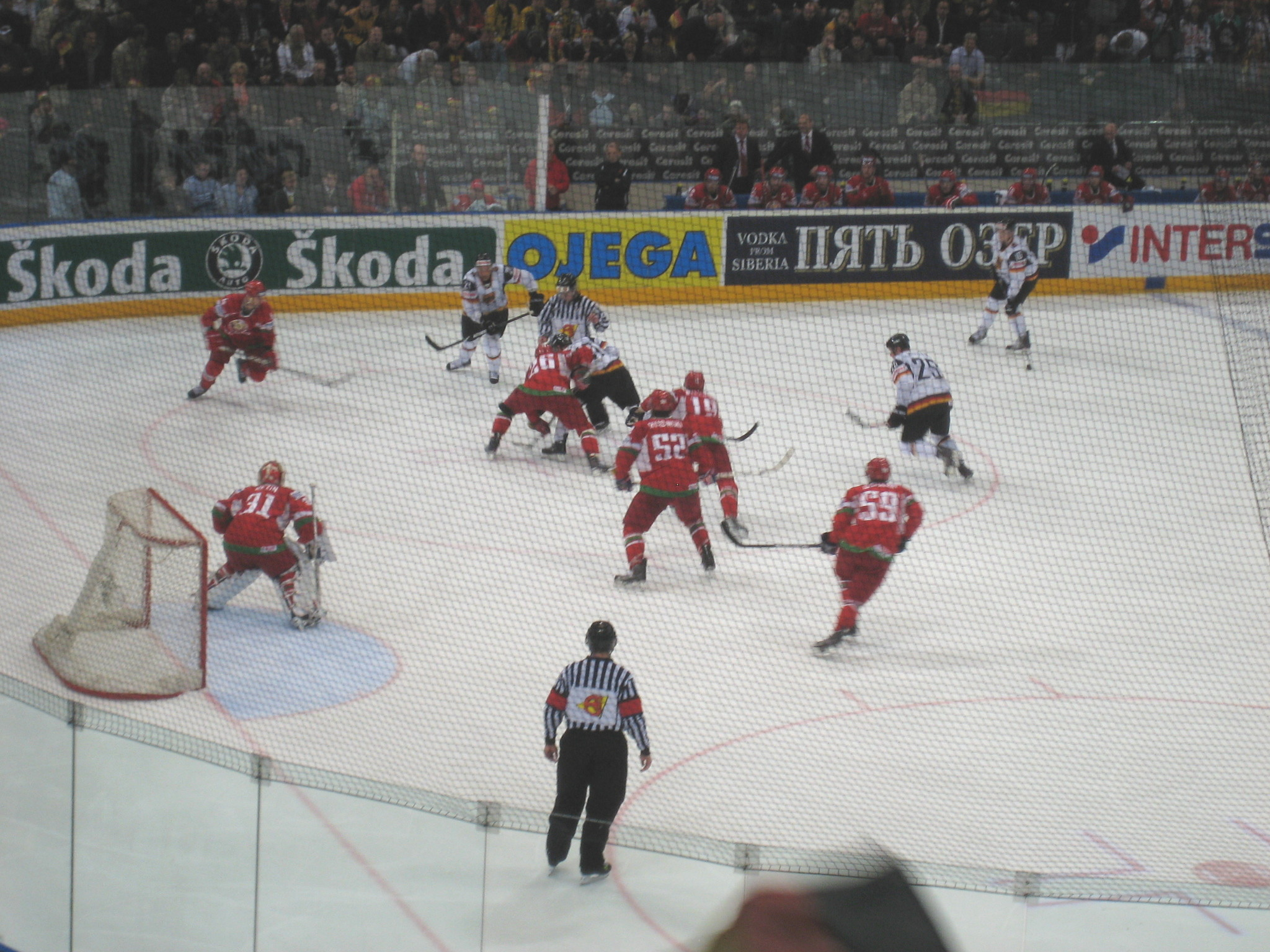 Spielszene zwischen Weißrussland und Deutschland bei der Weltmeisterschaft 2010 in der Kölnarena während der Verlängerung.